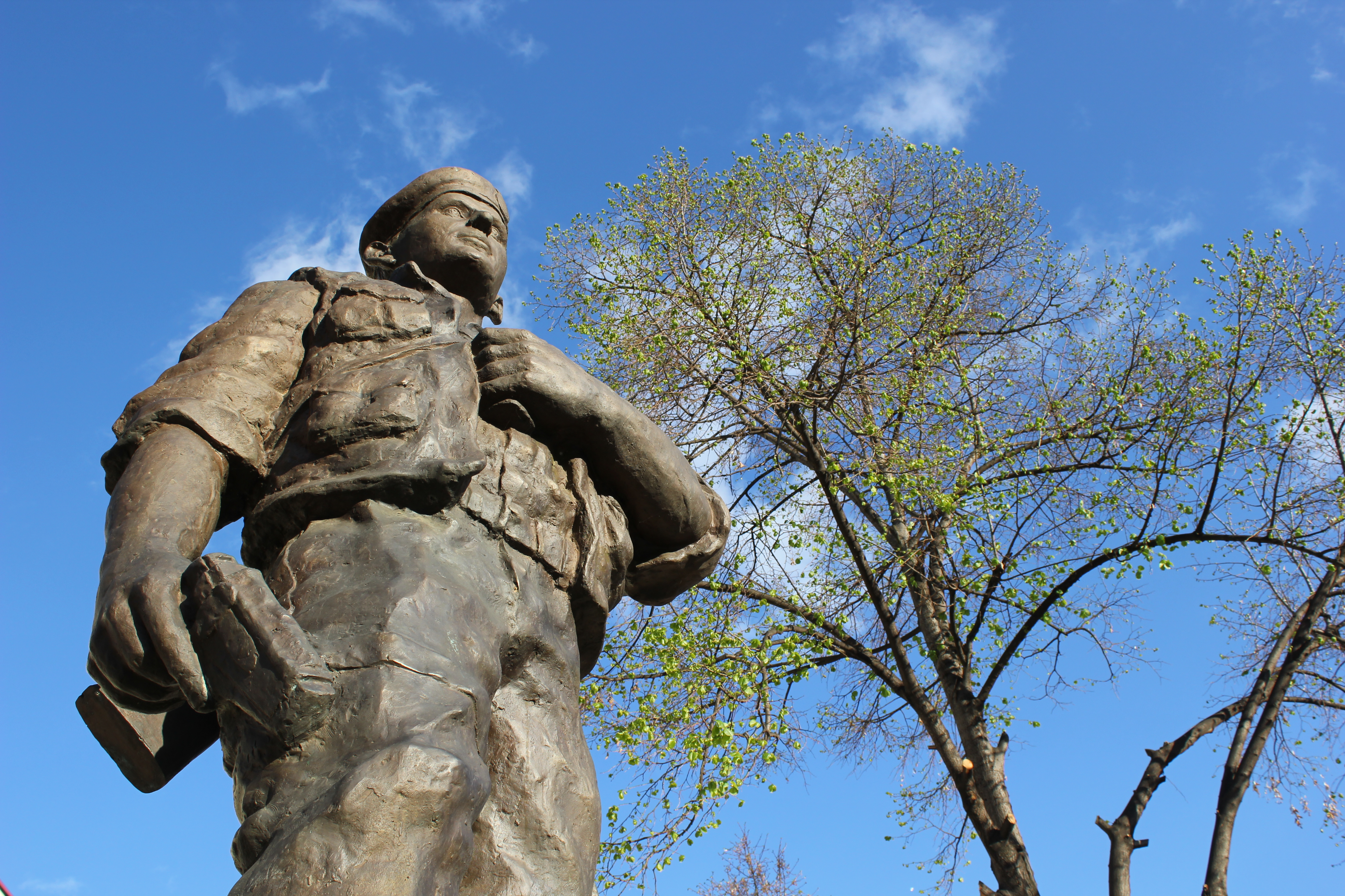 Statuja e komandant 'Shemsi Ahmeti', dëshmor i luftës së fundit